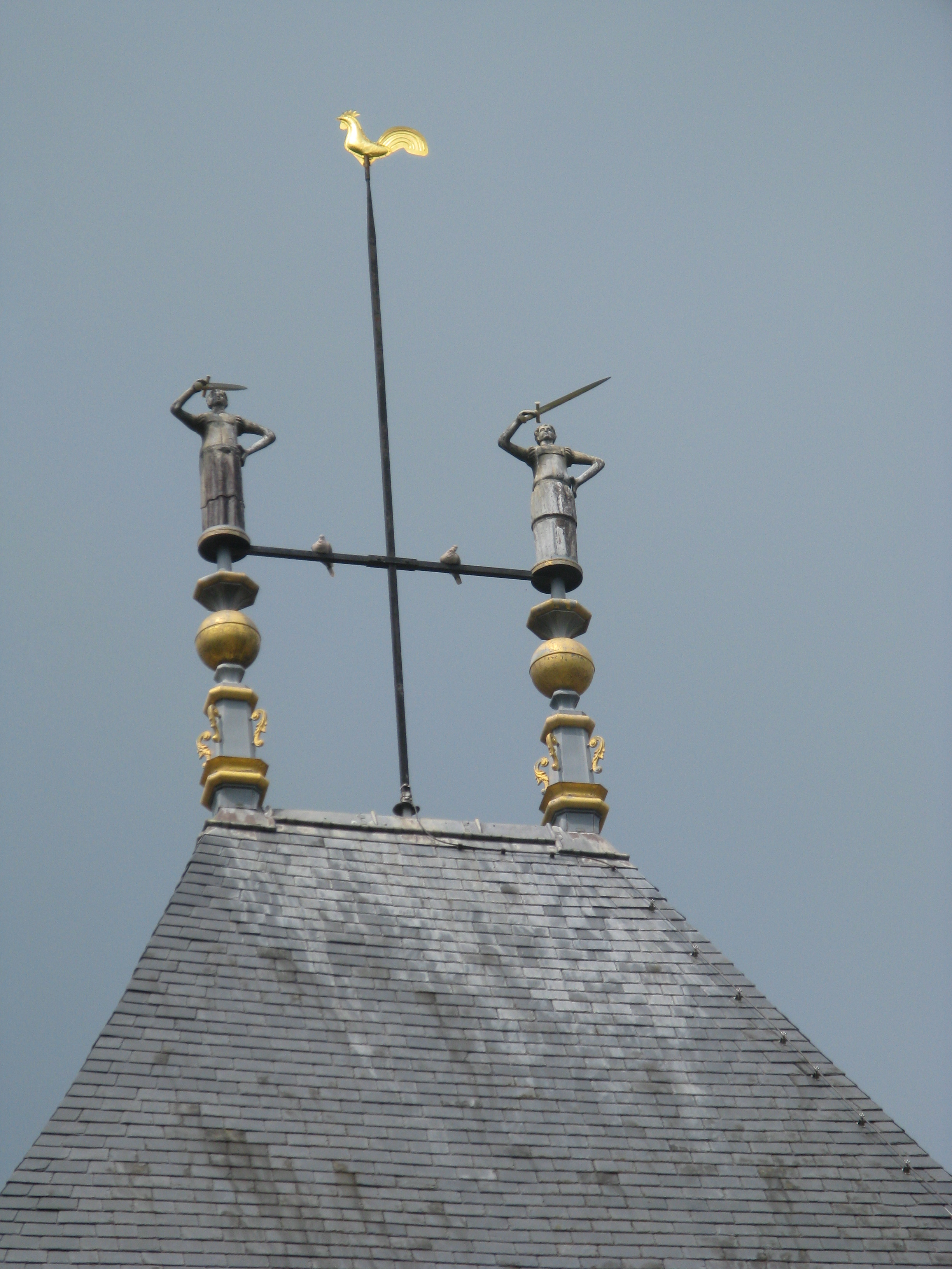 Statuettes en plomb de la porte de Joigny (villeneuve-sur-Yonne France) des templiers qui défendent l'entrée de la ville